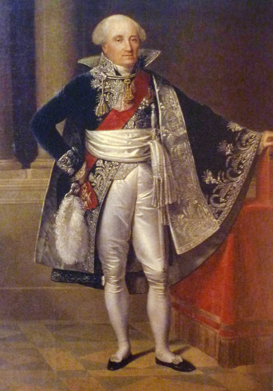 Joseph Jérôme Siméon (1749-1842)